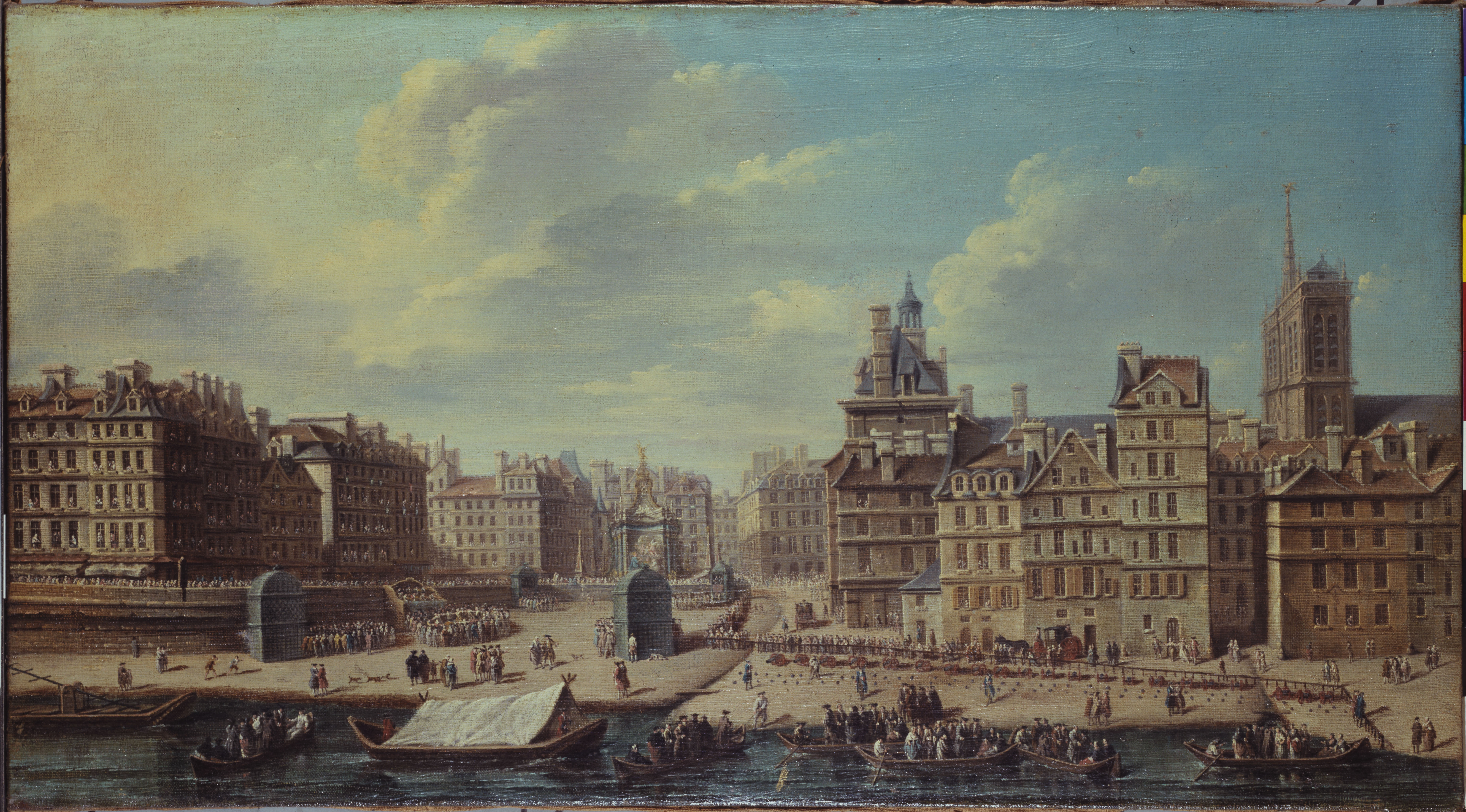 Place de Grève et décorations pour le feu d'artifice à l'occasion de la naissance de la princesse Marie-Thérèse, fille du Dauphin. Musée Carnavalet, Paris.